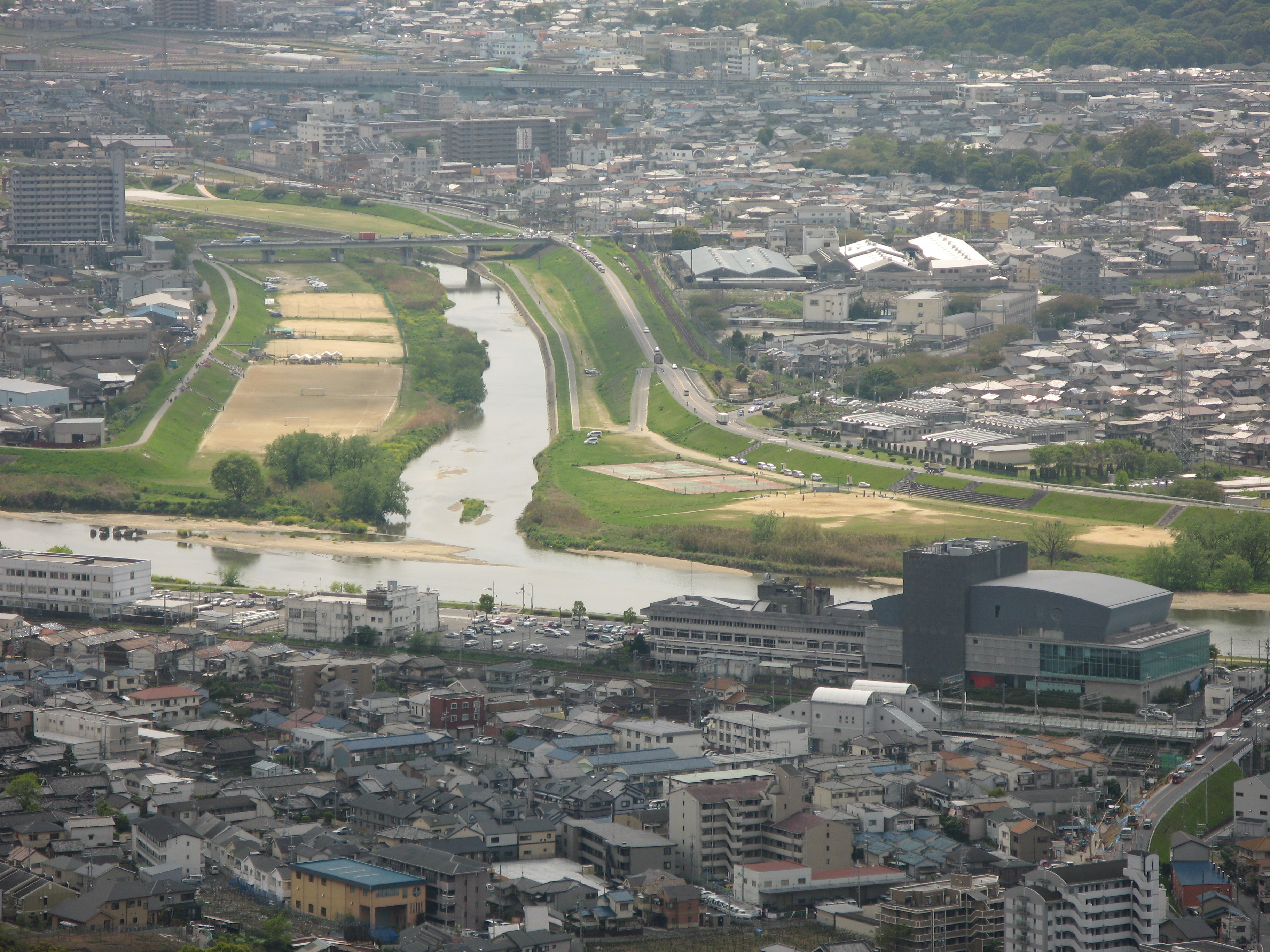 Yamato River at Kashiwara and Fujiidera, Osaka, Japan